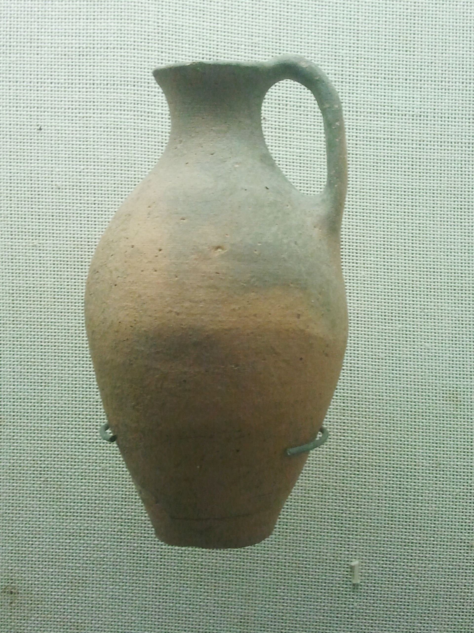 קנקן כלי אבידוס תקופת הברונזה הקדומה, נמצא בתל בית ירח. תצוגה מוזיאון בית גורדון קיבוץ דגניה א